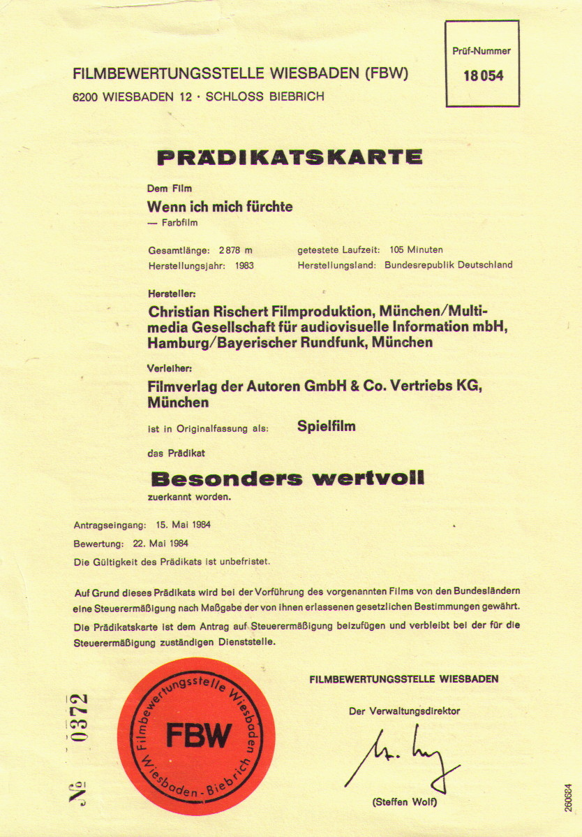 FBW-Karte